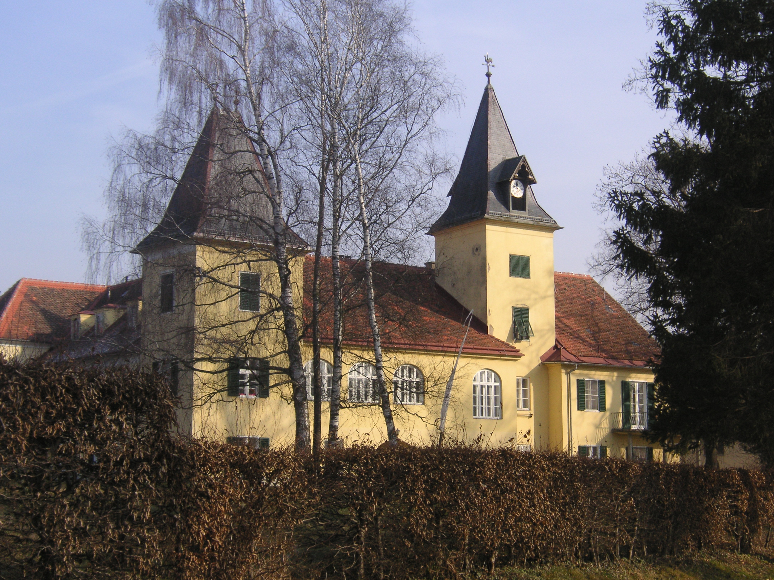 Land- und forstwirtschaftliche Fachschule Grottenhof-Hardt (Harterschlössl)